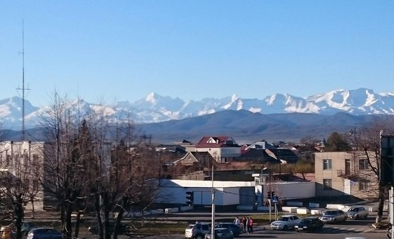 Вид на город Чегем